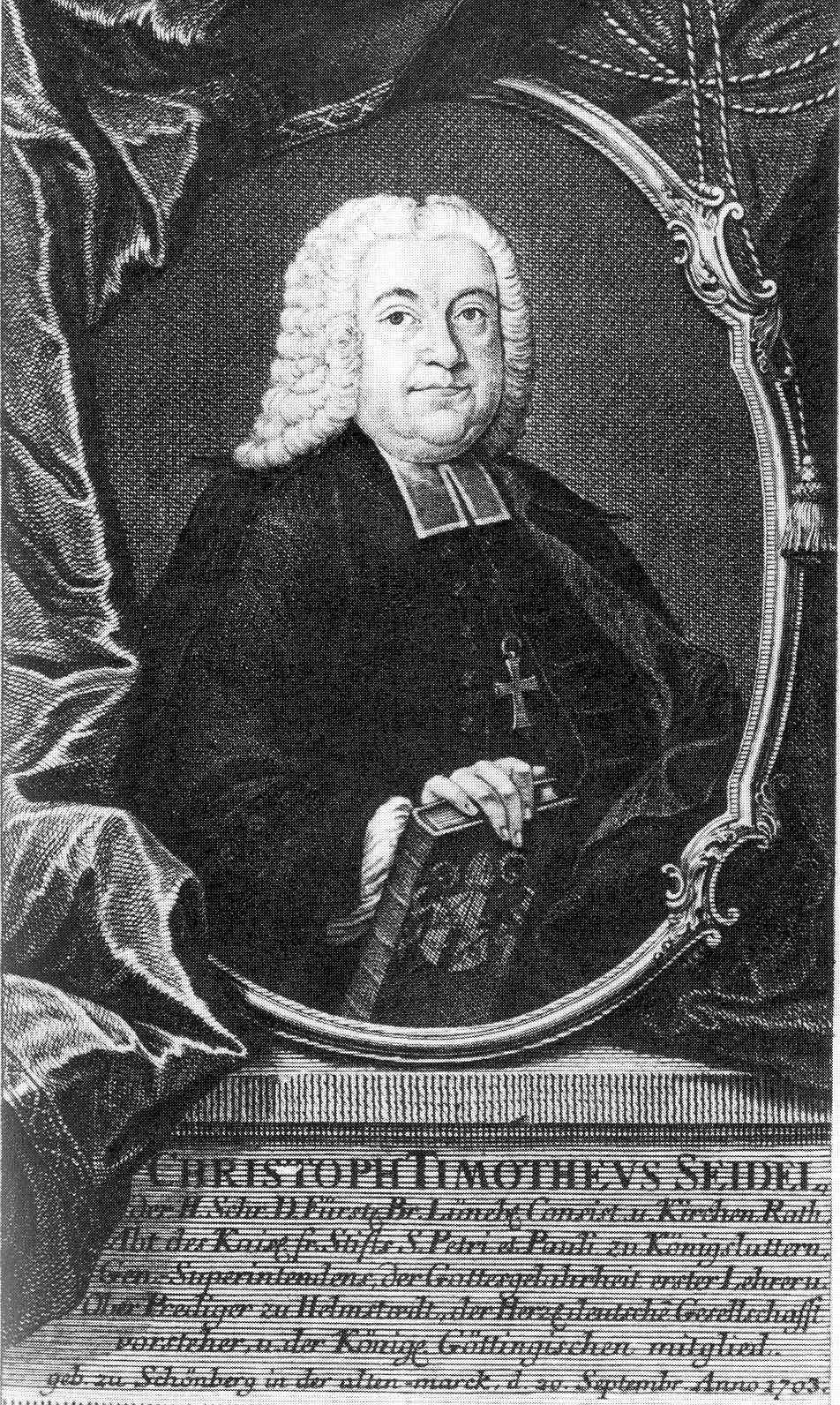 Christoph Timotheus Seidel (1703–1758), Professor an der Universität Helmstedt.